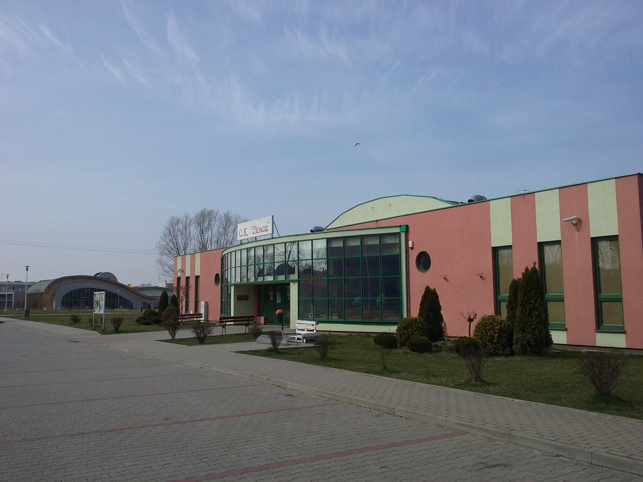 Tomaszów Mazowiecki w województwie łódzkim, PL, EU. Jeden z kilku w mieście domów kultury. Ośrodek Kultury Tkacz na Niebrowie. CC0